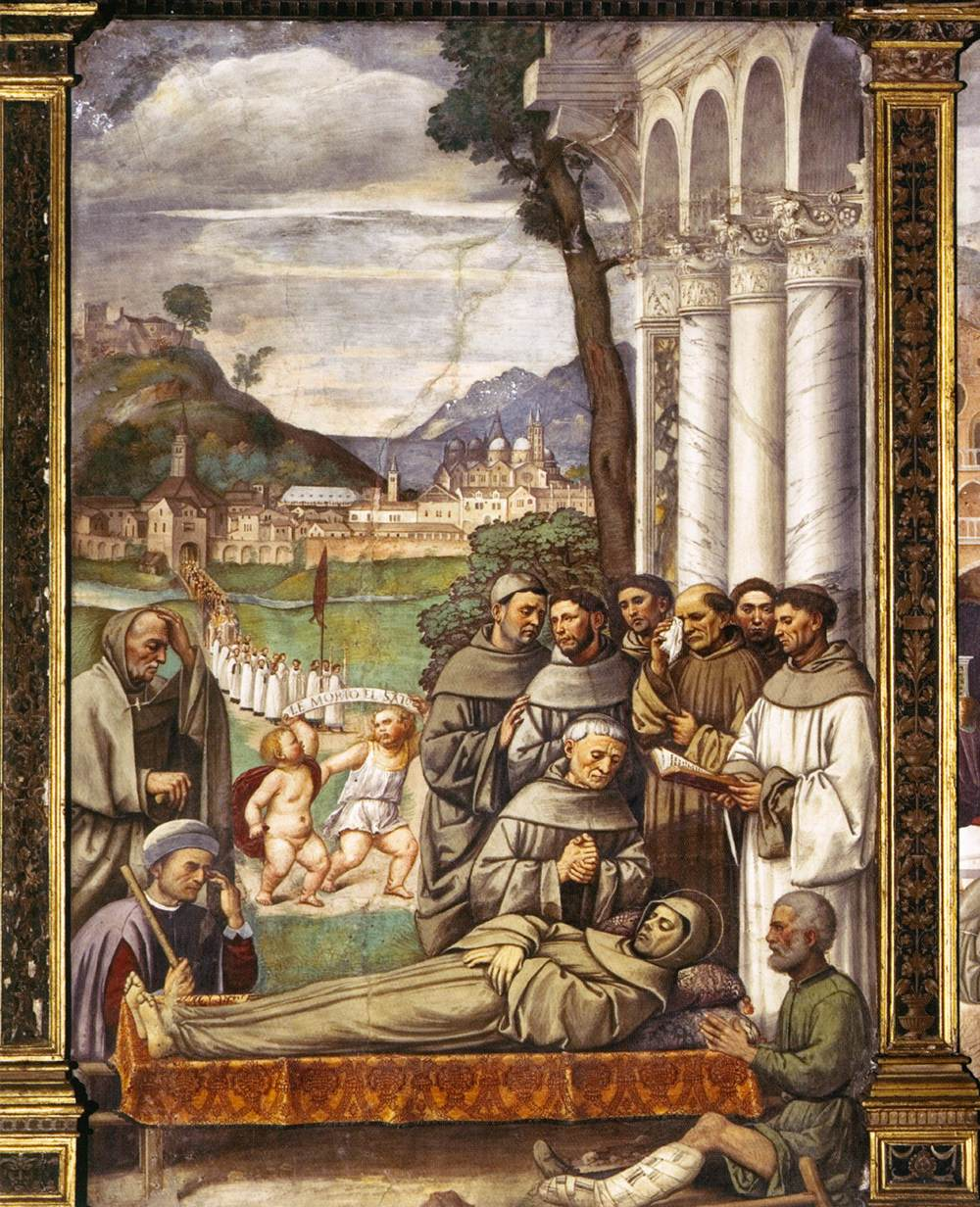 Death of St Anthony 1776 Fresco Sala Capitolare, Scuola del Santo, Padua